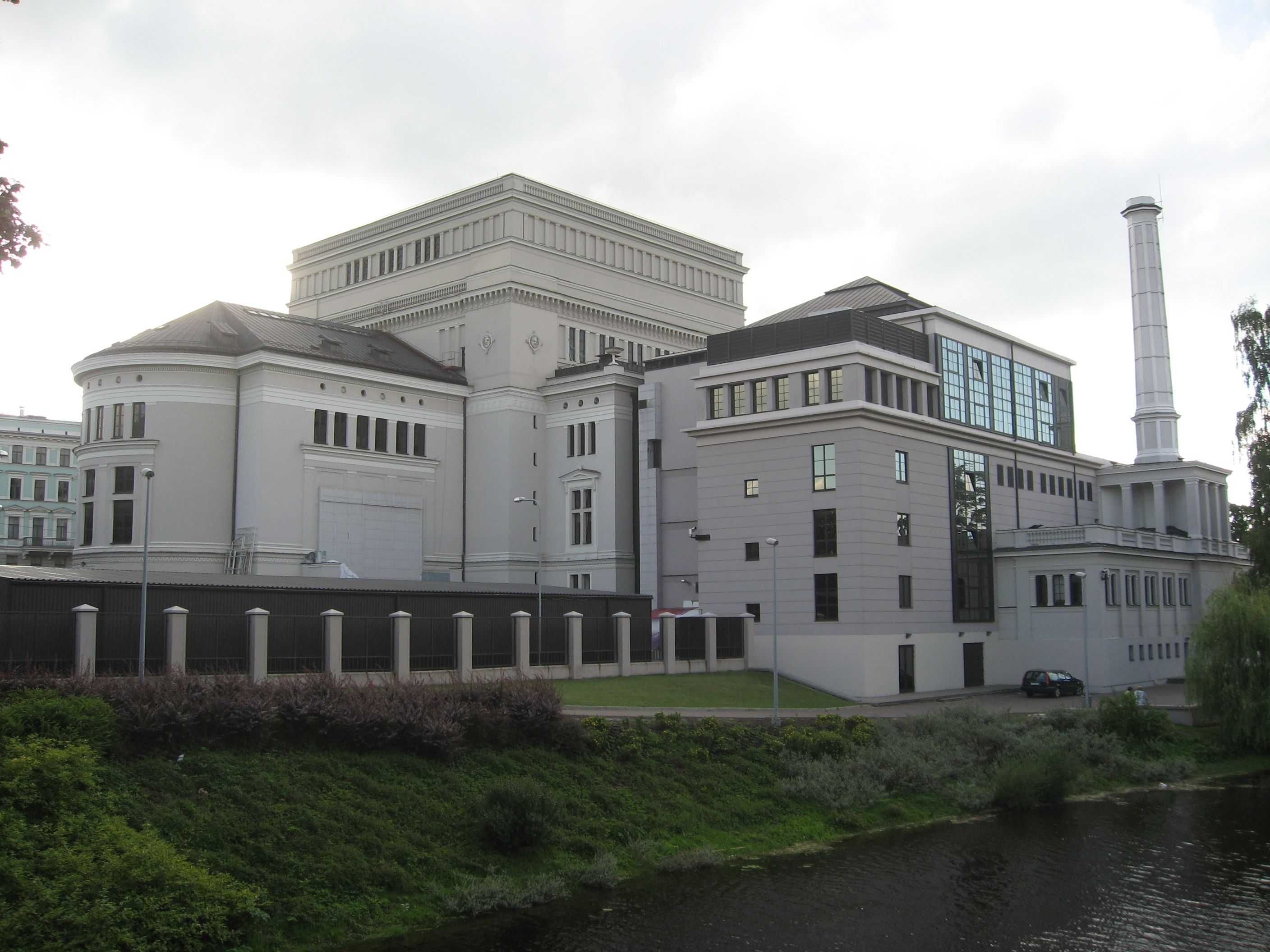 Národní opera v Rize